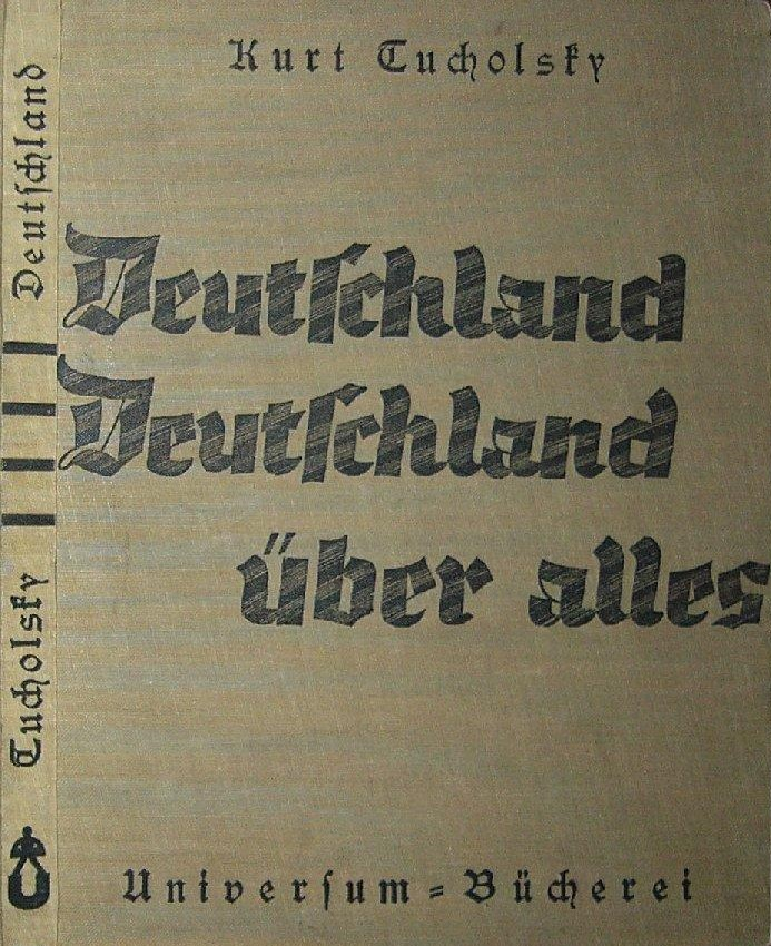 Deutschland, Deutschland über alles. Ein Bilderbuch von Kurt Tucholsky und vielen Fotografen. Montiert von John Heartfield, Universum-Bücherei für Alle, Berlin, 1929. 231 S. Universum-Bücherei Band 54. Einband von Paul Urban